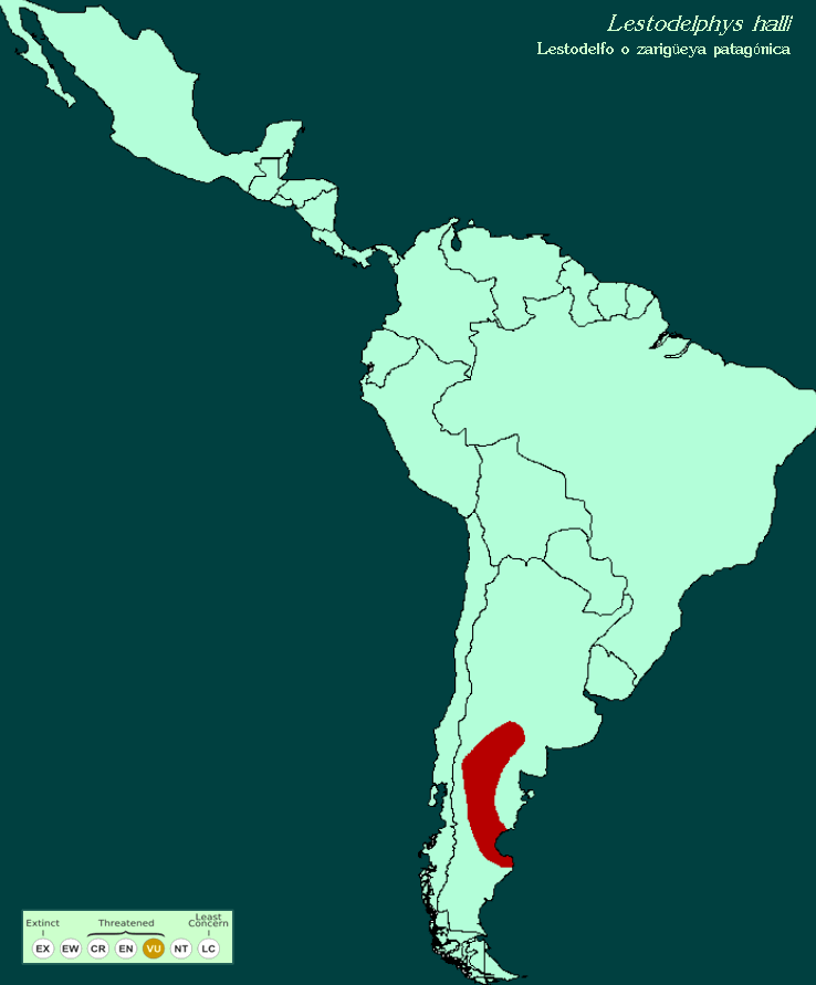 Mapa del área de distribución de Lestodelphys halli